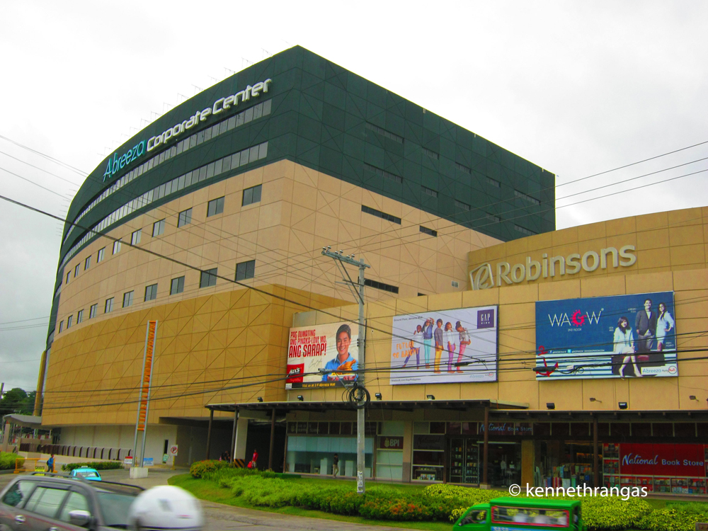 Abreeza Corporate Center